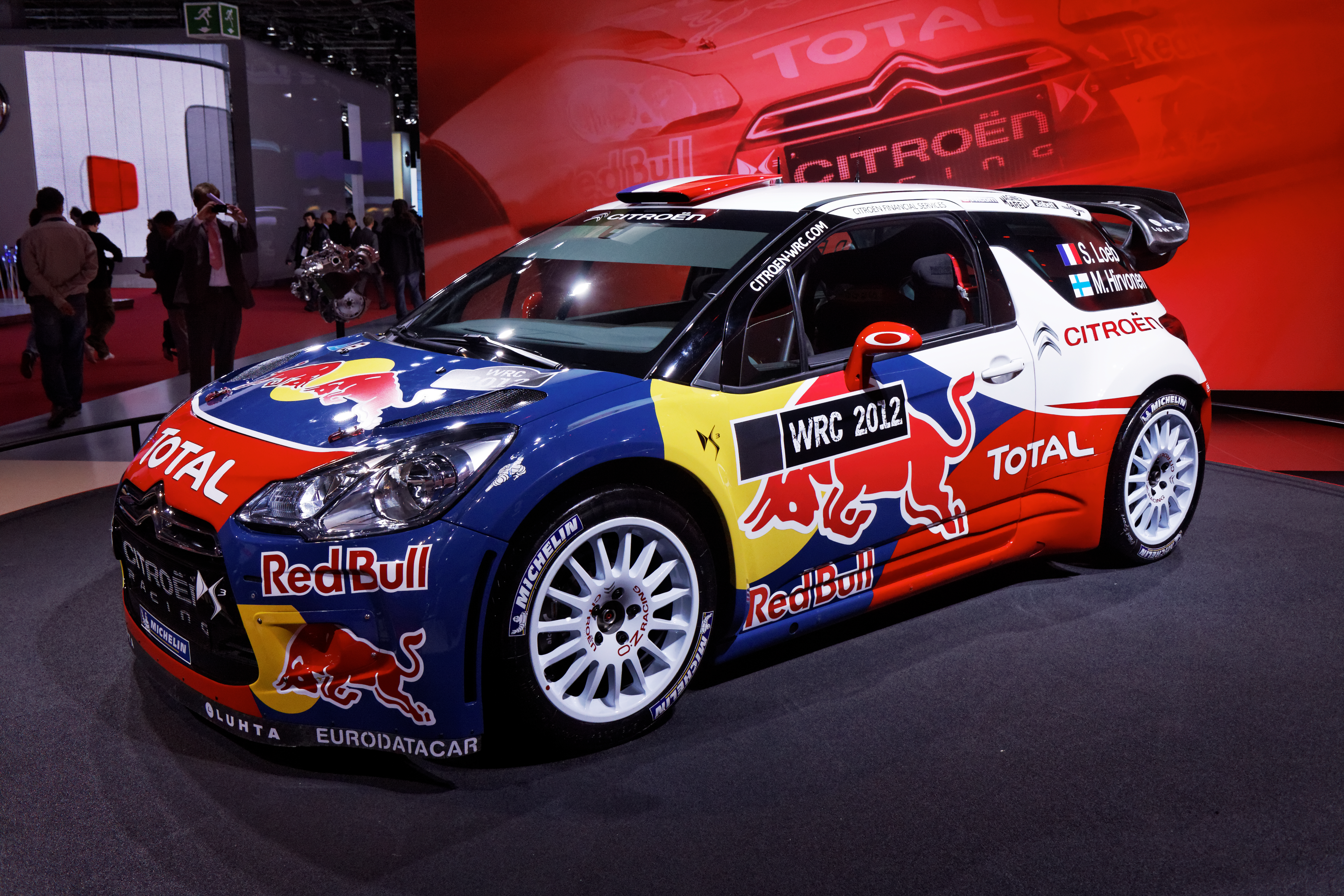 Une Citroën DS3 WRC présentée lors du Mondial de l'Automobile de Paris 2012.